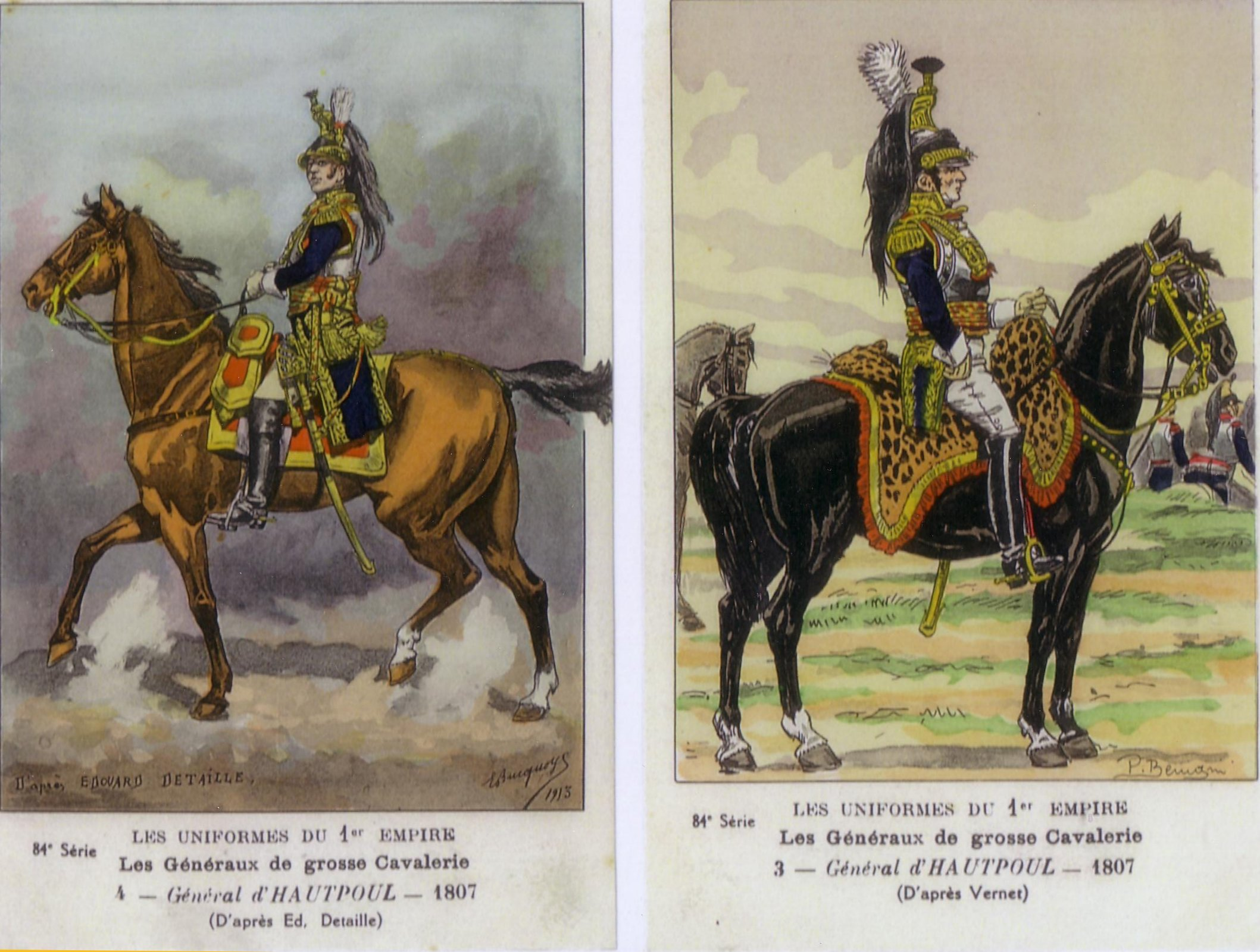 Général Hautpoul